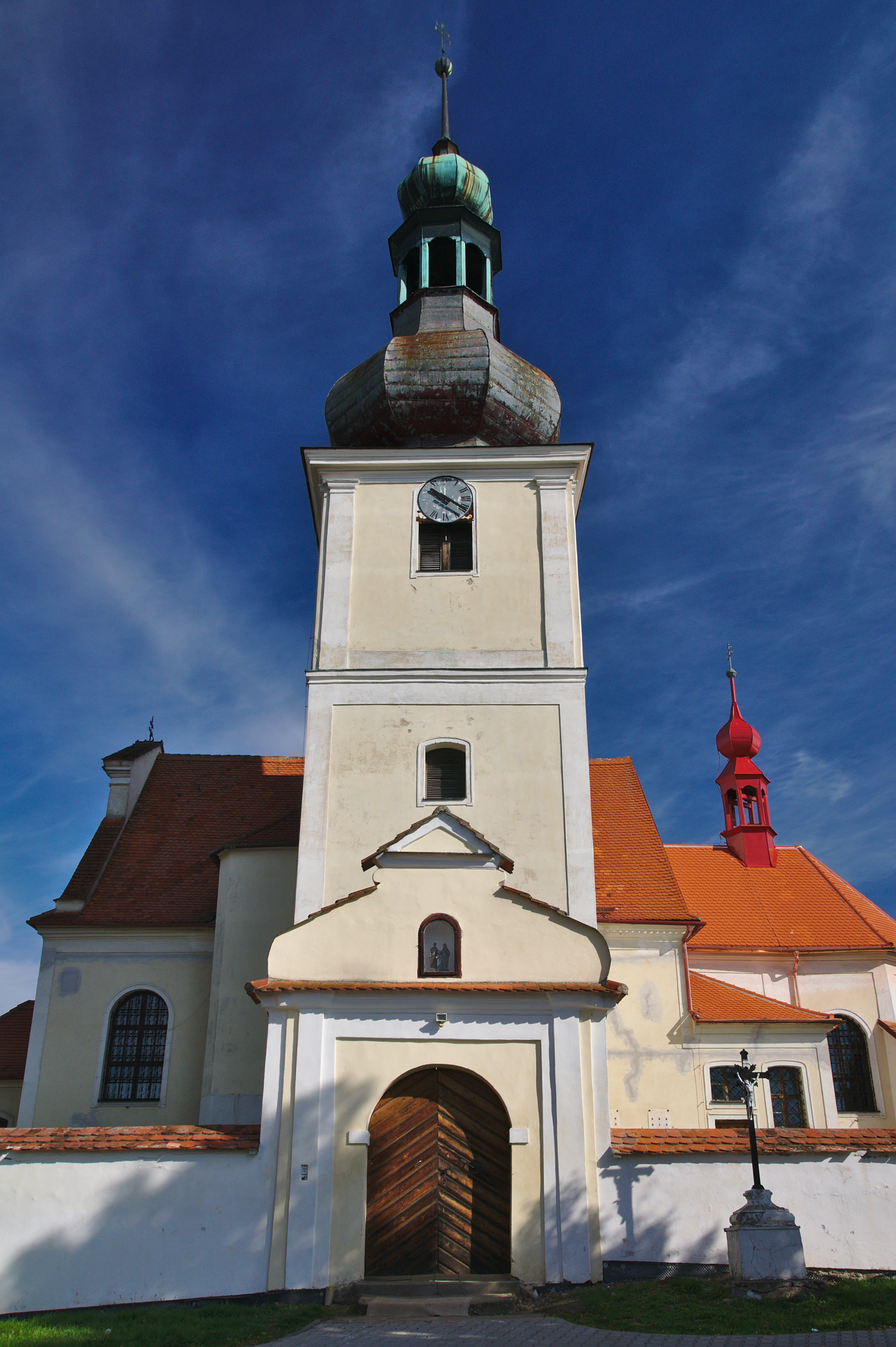 Kostel Nanebevzetí Panny Marie, Sebranice, okres Blansko